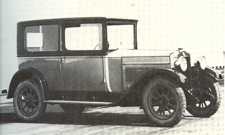 Fiat 509 Sedan (1925)